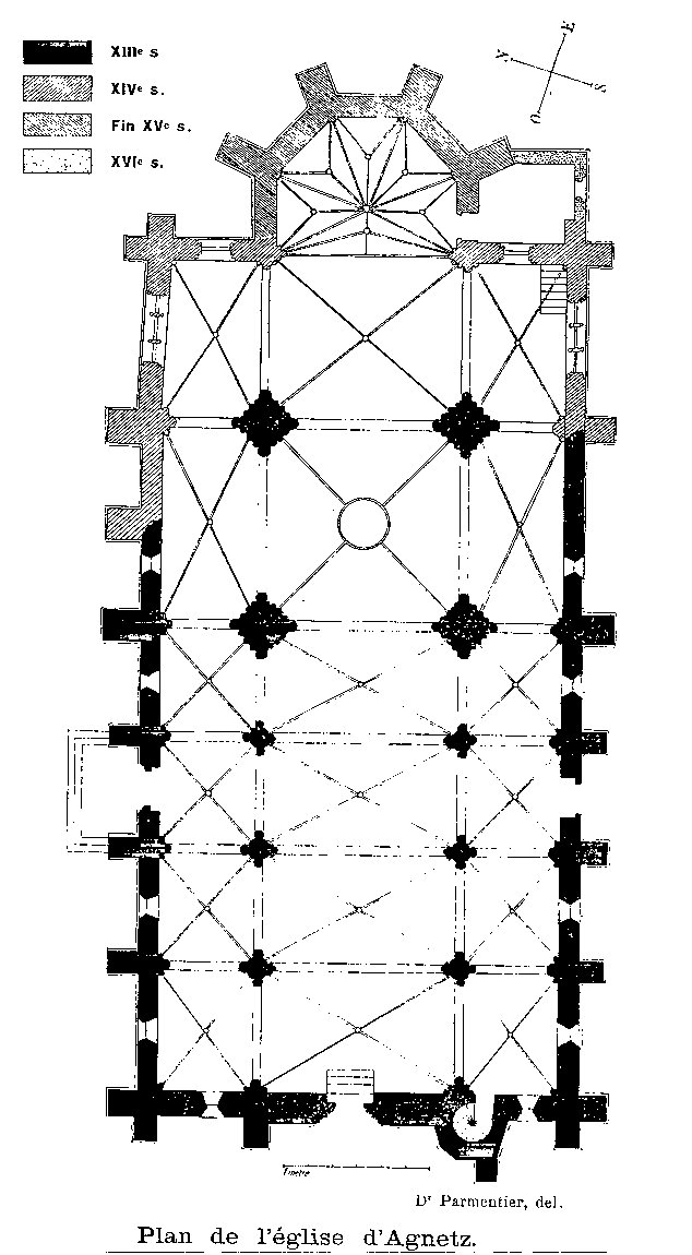 Plan de l'église ; datation révisée d'après Bideault et Lautier (1987) ; la datation des portails (1250) ne paraît pas.